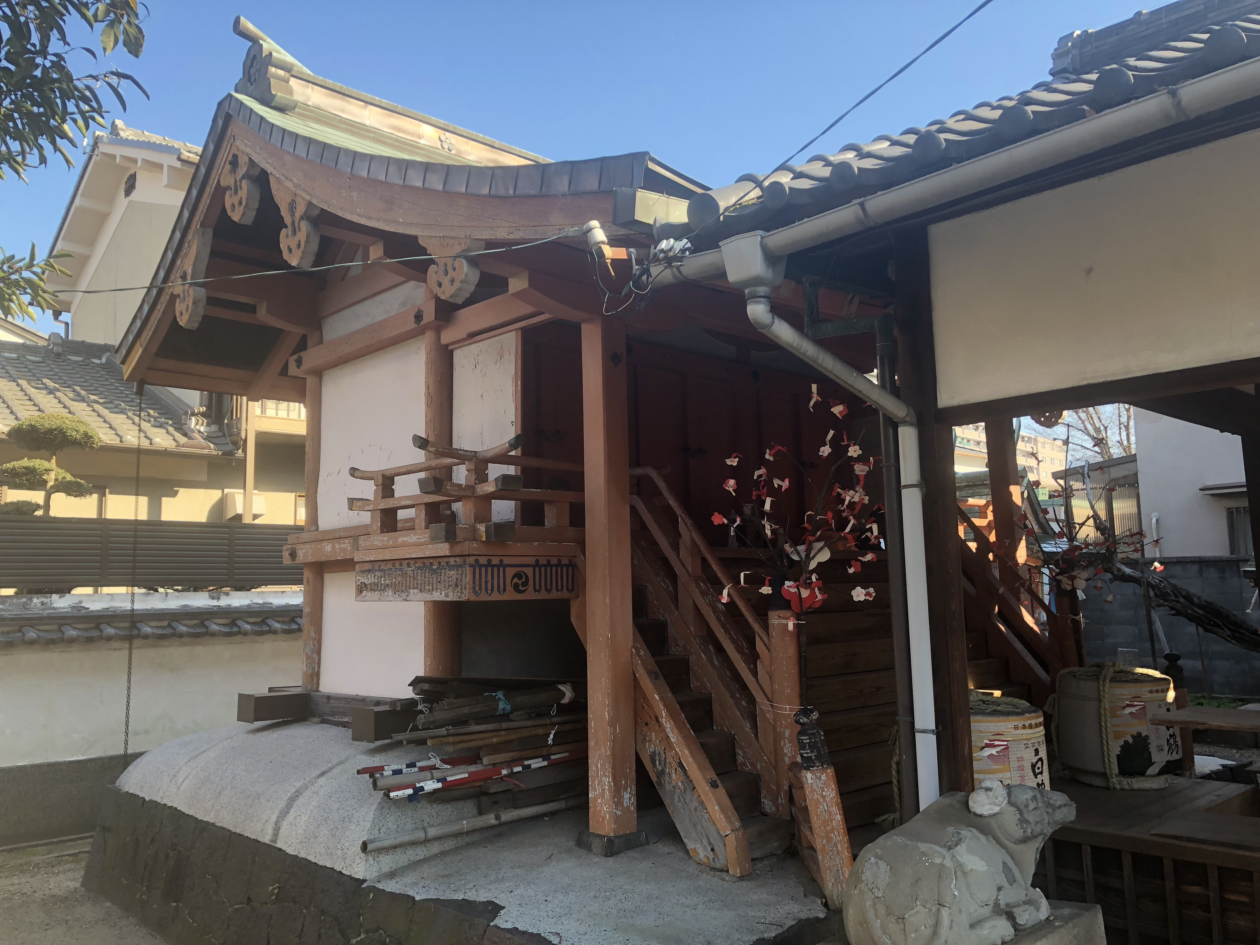 奈良市 飛鳥神社（京終天神社）本殿